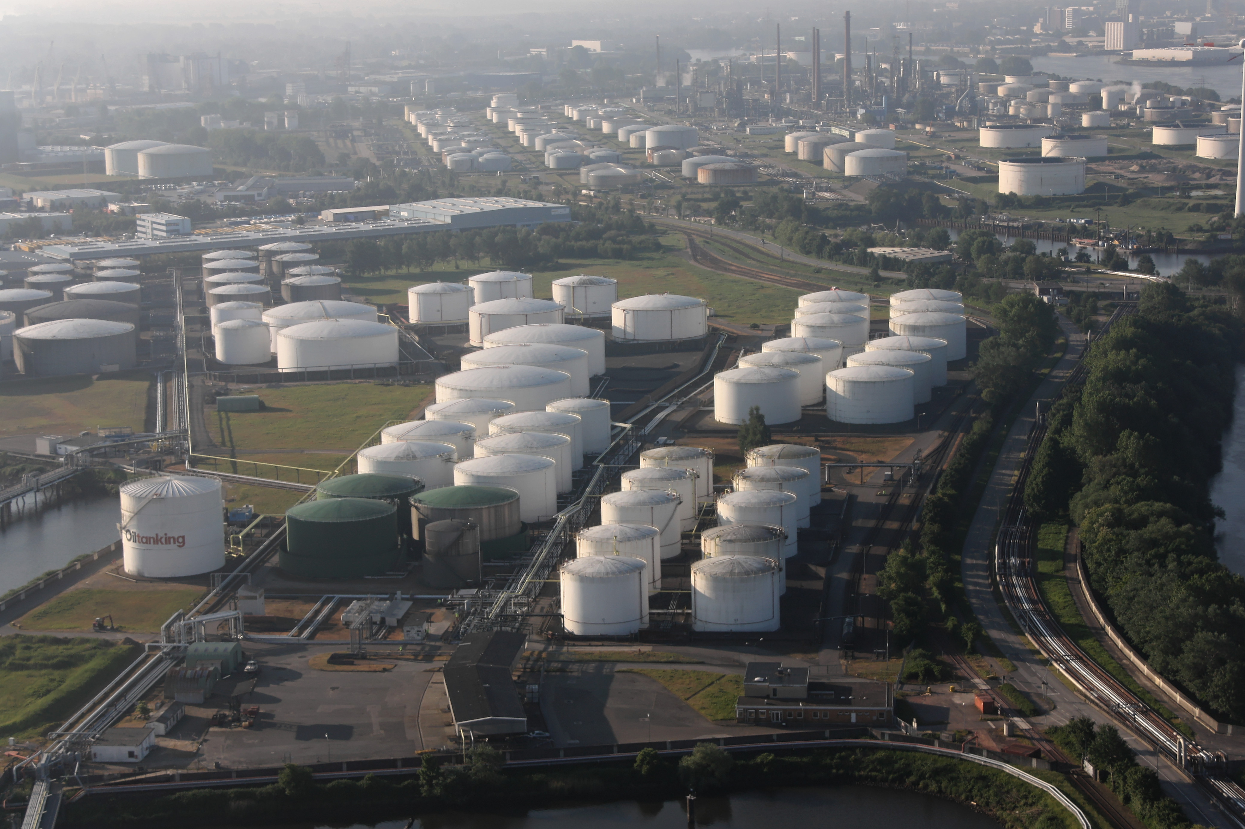 Hamburger Hafen, hinten: Betriebsgelände Shell auf der Kattwyk, vorne: Tanklager Oiltanking Hamburg